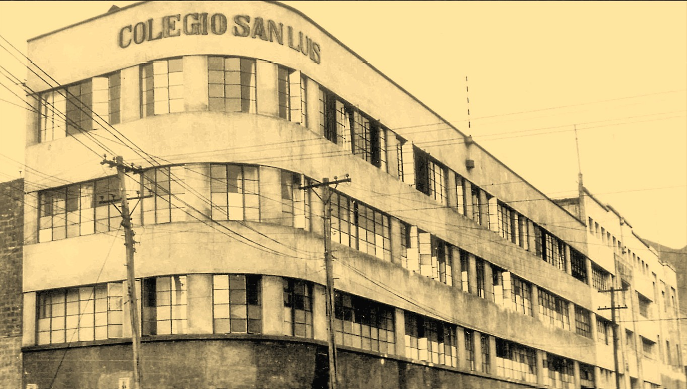 El Colegio San Luis de Antofagasta